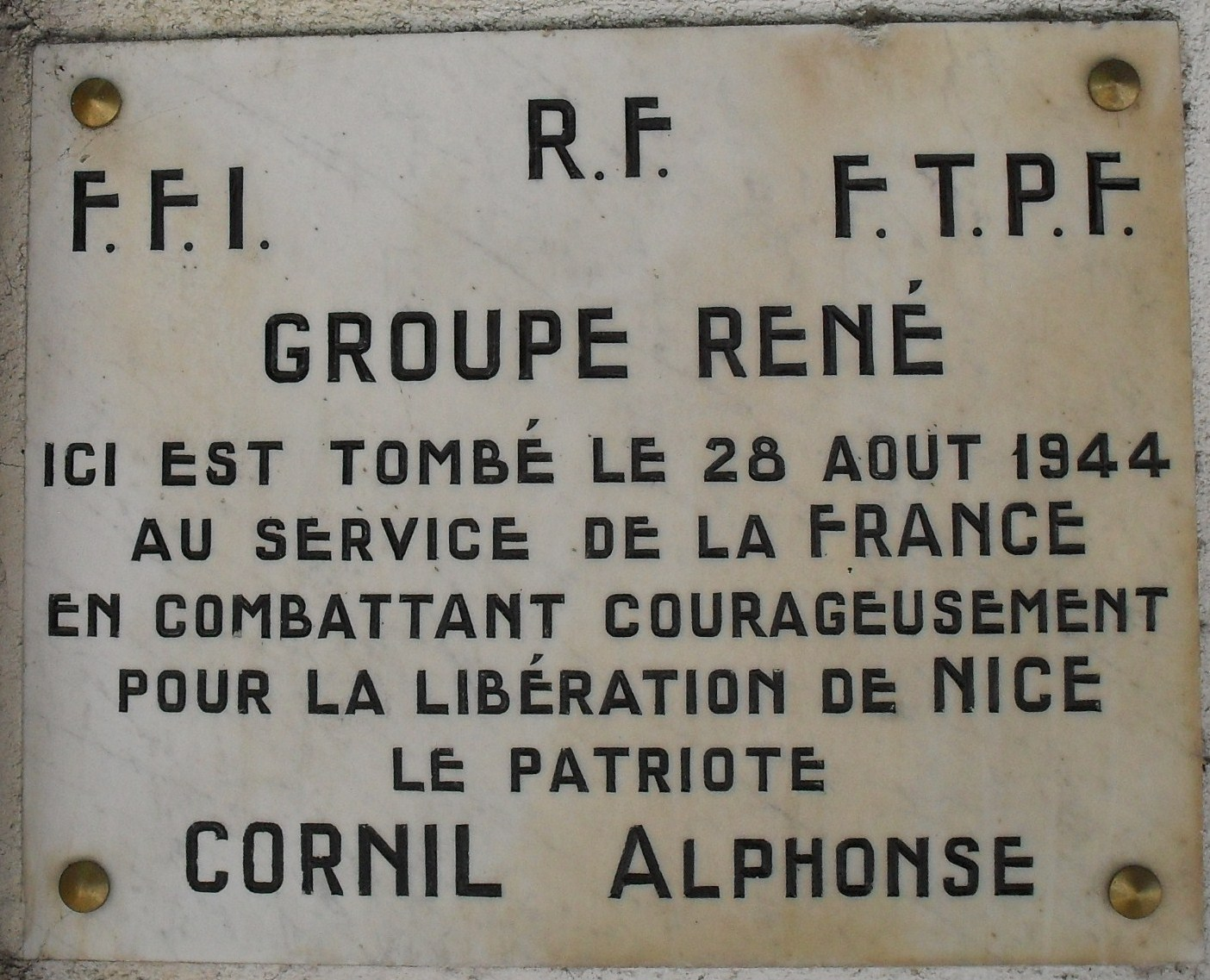 Photo de la plaque commémorative située 130 boulevard Gambetta et érigée en l'honneur du FFI Alphonse CORNIL tué le 28 août 1944 lors des combats pour la libération de Nice